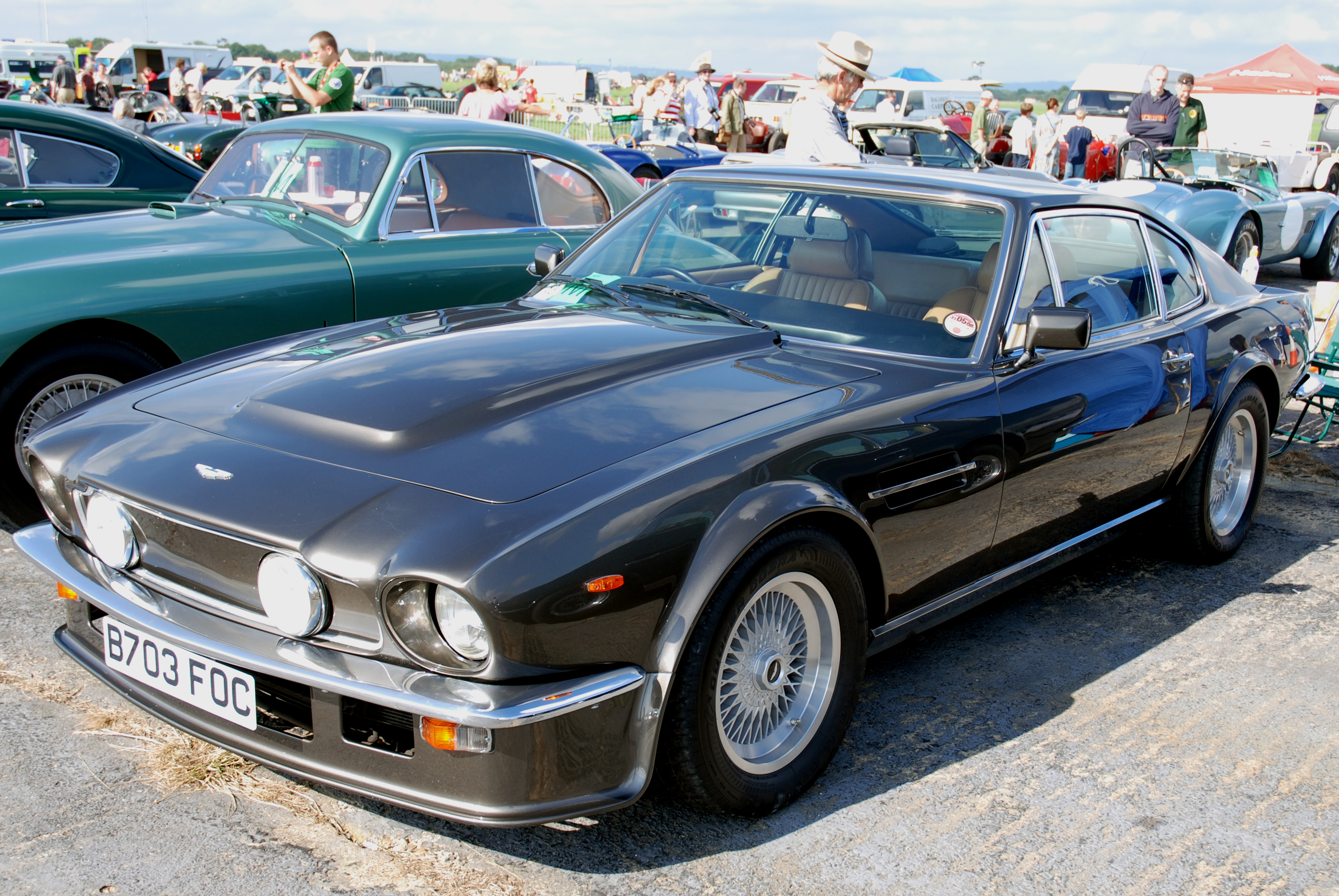 @ Dunsfold Wheels and Wings 2007